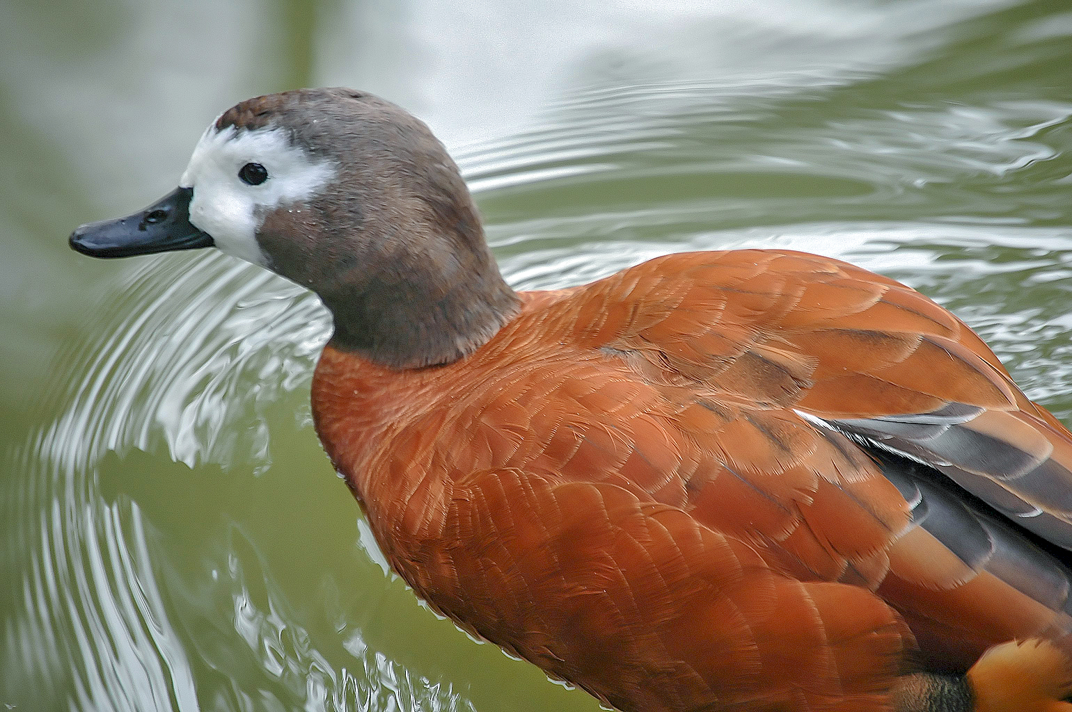 Tadorna cana, female